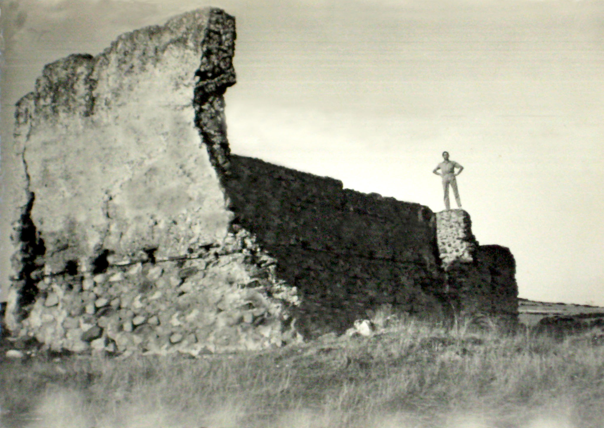 En 1967 todavía estaban en pie dos de los paredones de la iglesia de El Villar.